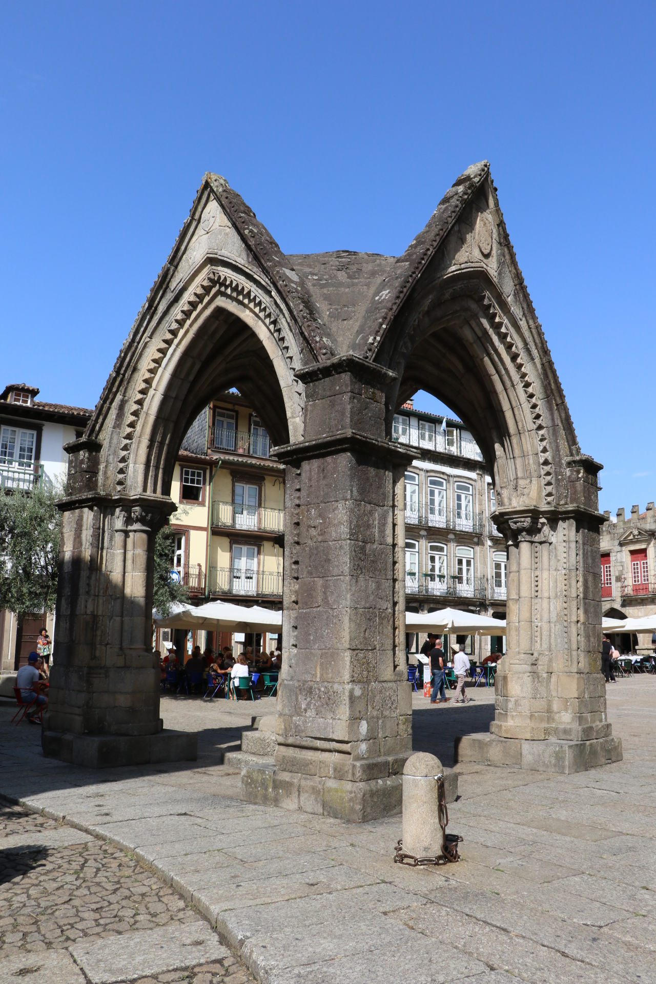 Erguido no século XIV por iniciativa de Afonso IV de Portugal para comemorar a vitória na Batalha de Salado, em 1340. Situado em frente à Igreja de Nossa Senhora da Oliveira.